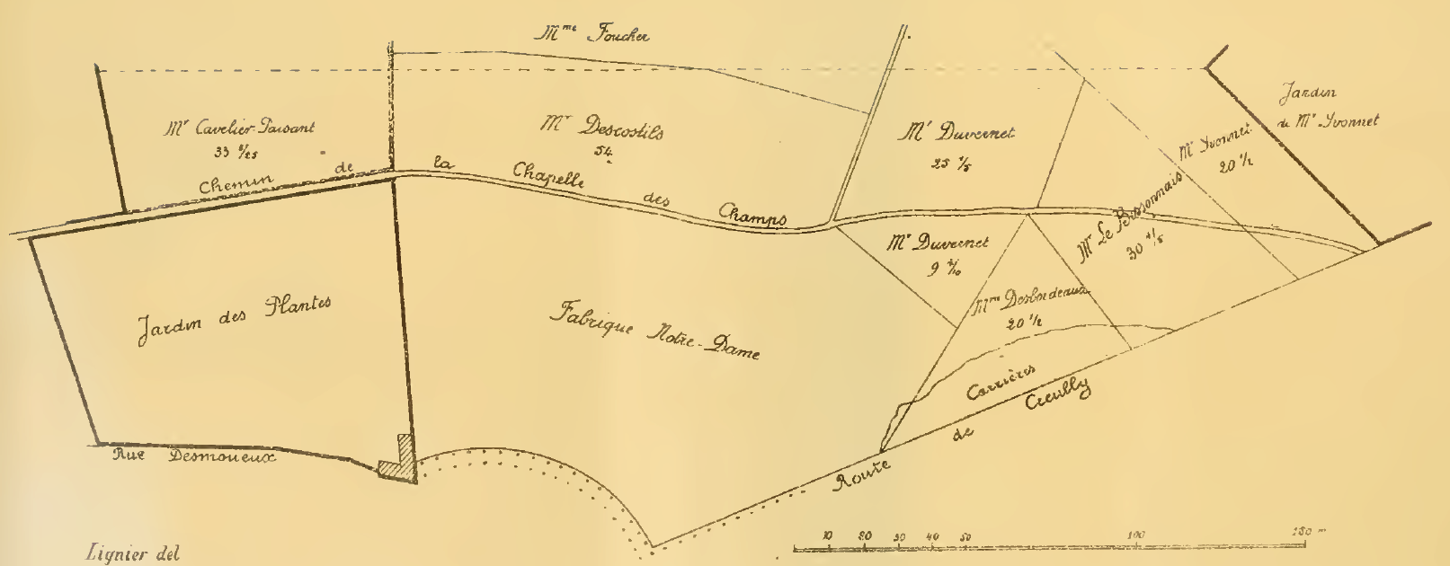 distribution des terrains achetés pour l'agrandissement du jardin des plantes de Caen